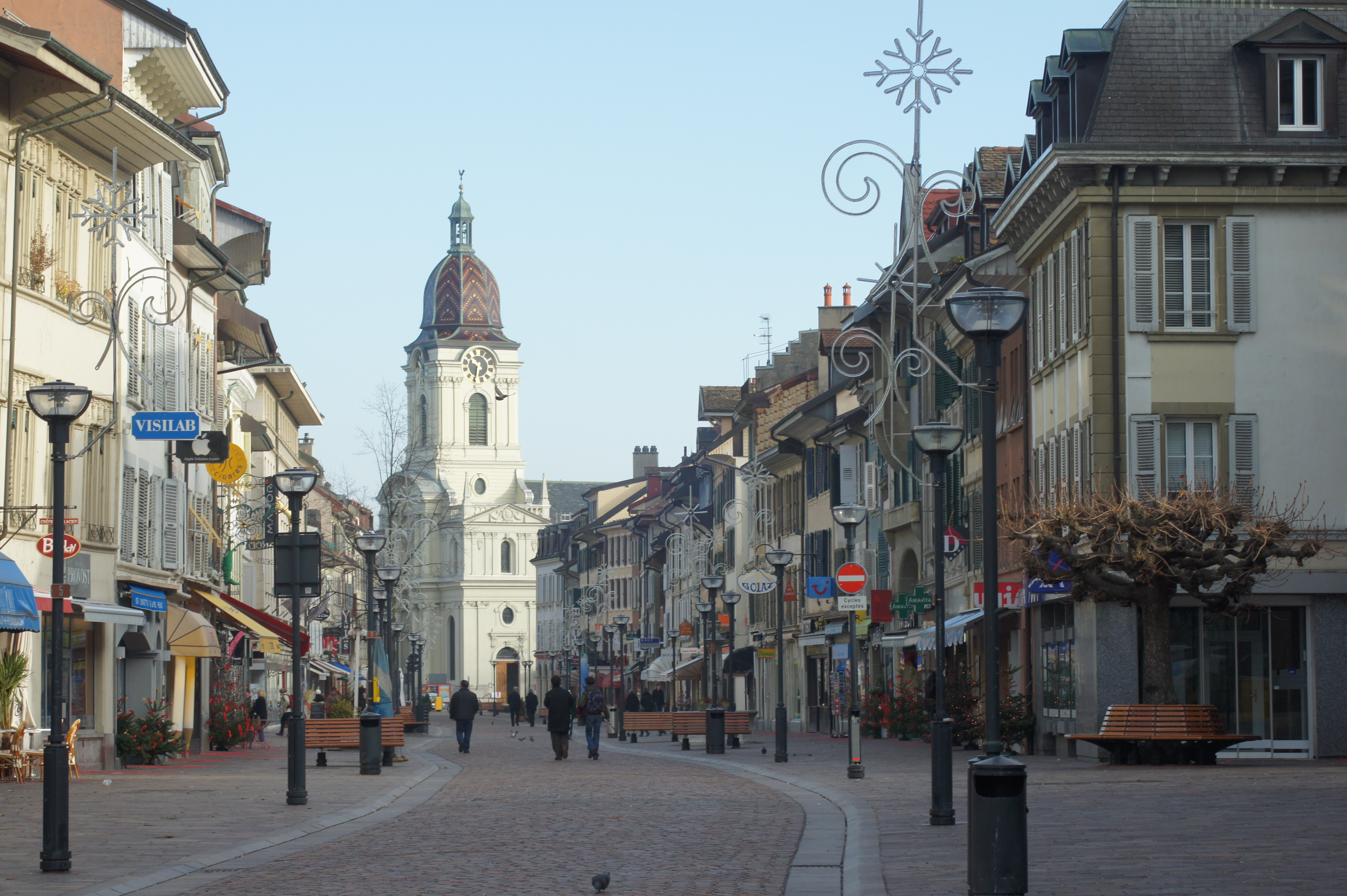 Vue du temple de Morges depuis la Grand-Rue